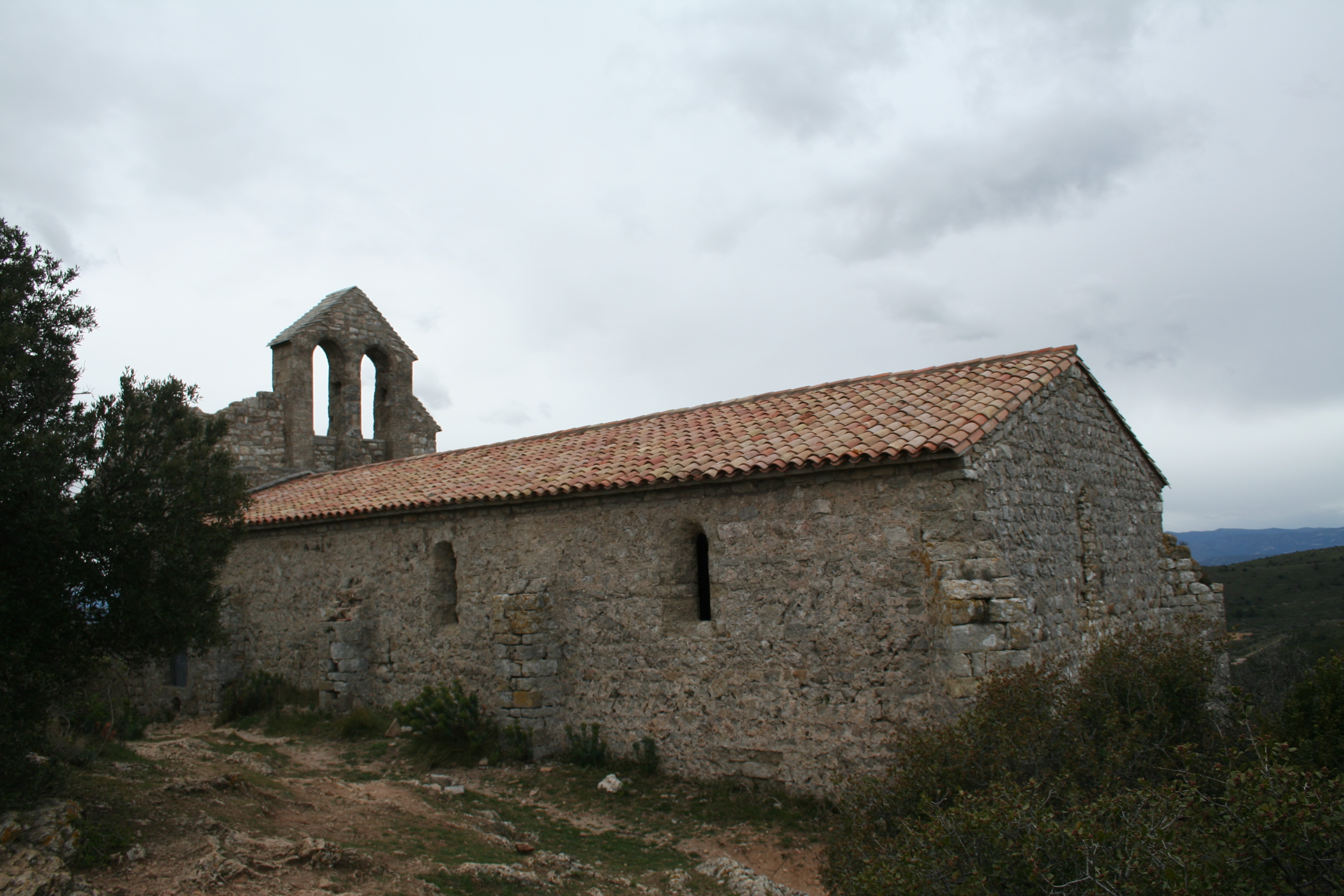 Aumelas (Hérault) - chapelle castrale Saint-Sauveur.